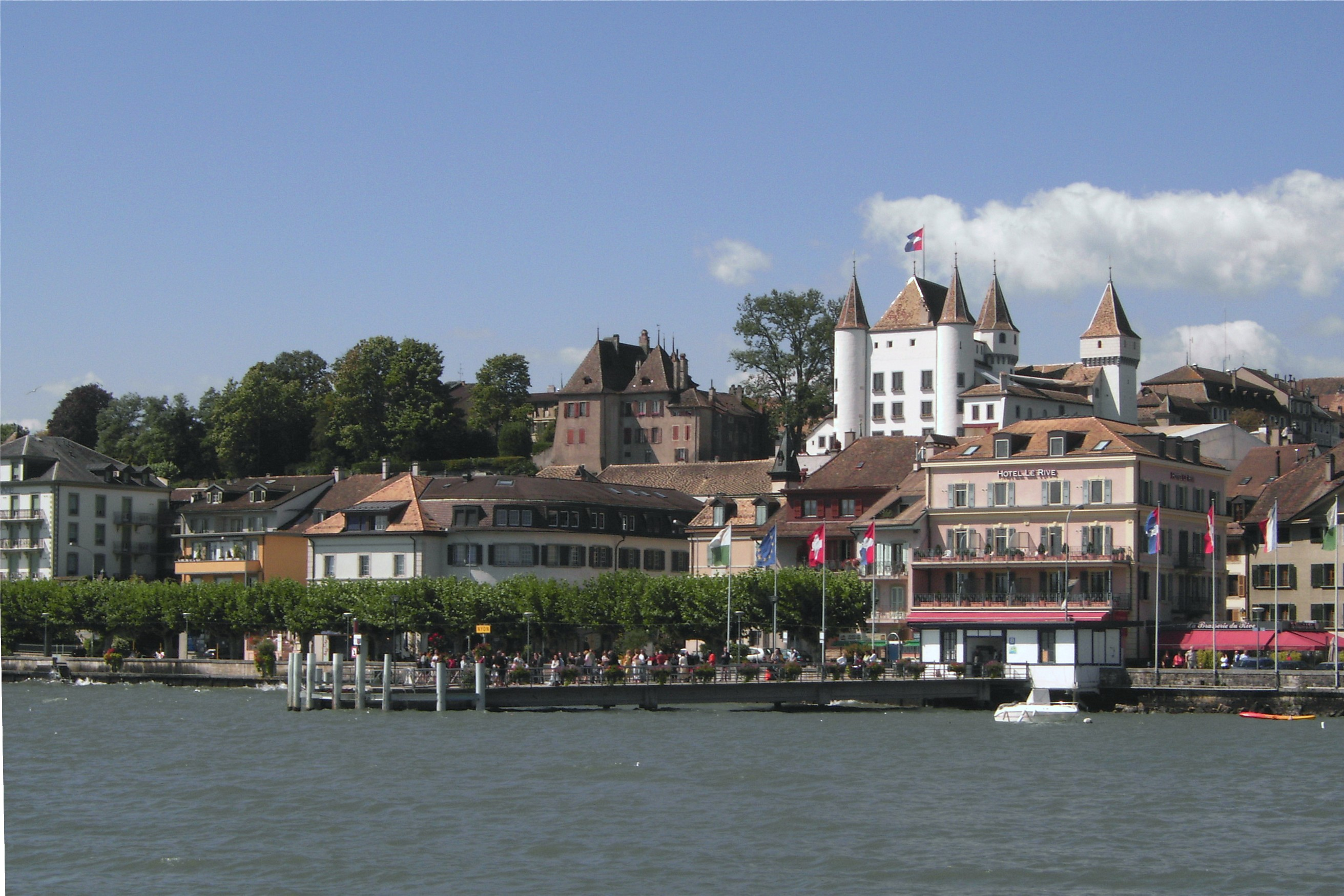 Nyon vom Genfer See